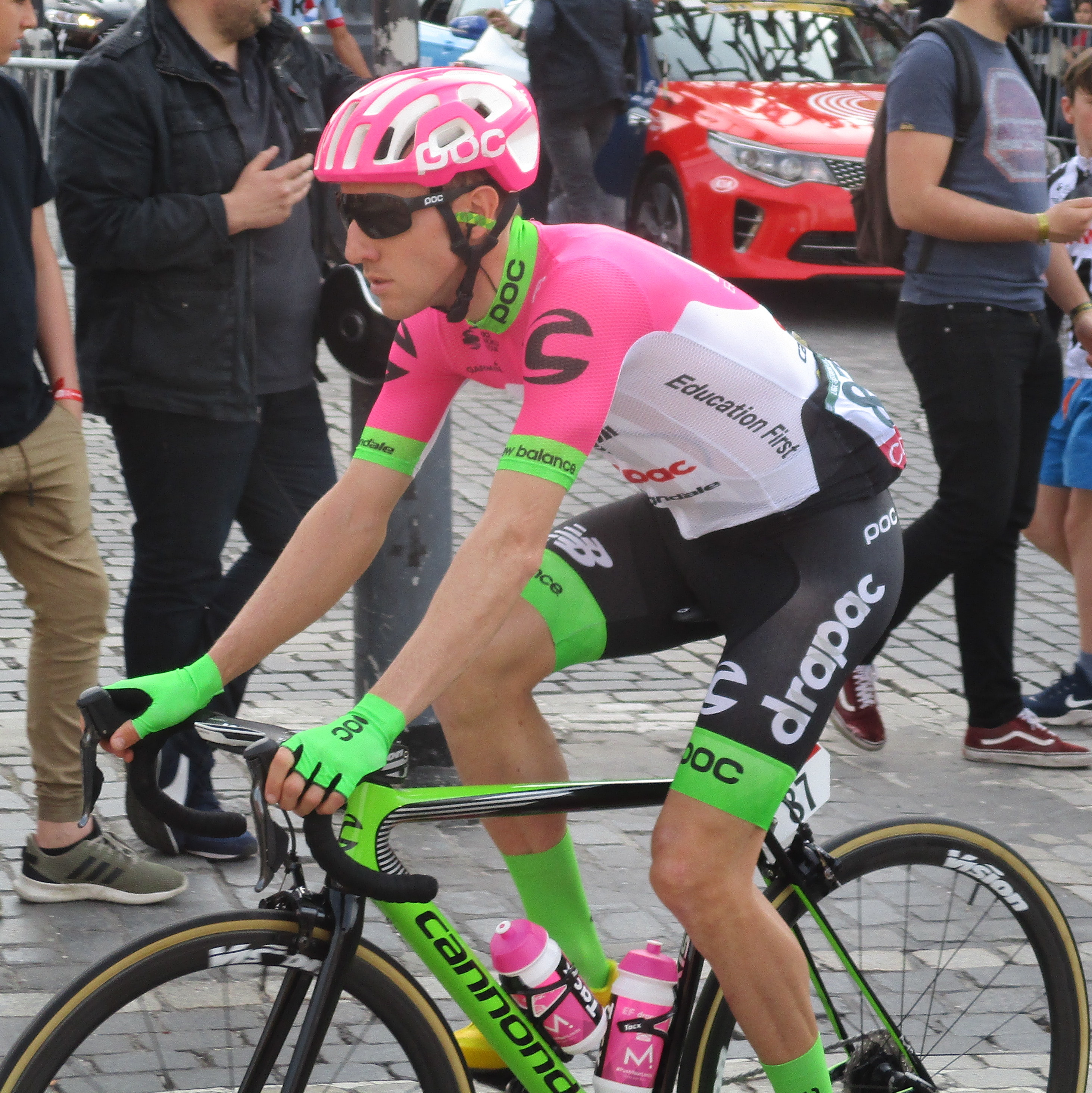 Start van Luik-Bastenaken-Luik 2018 in Luik.